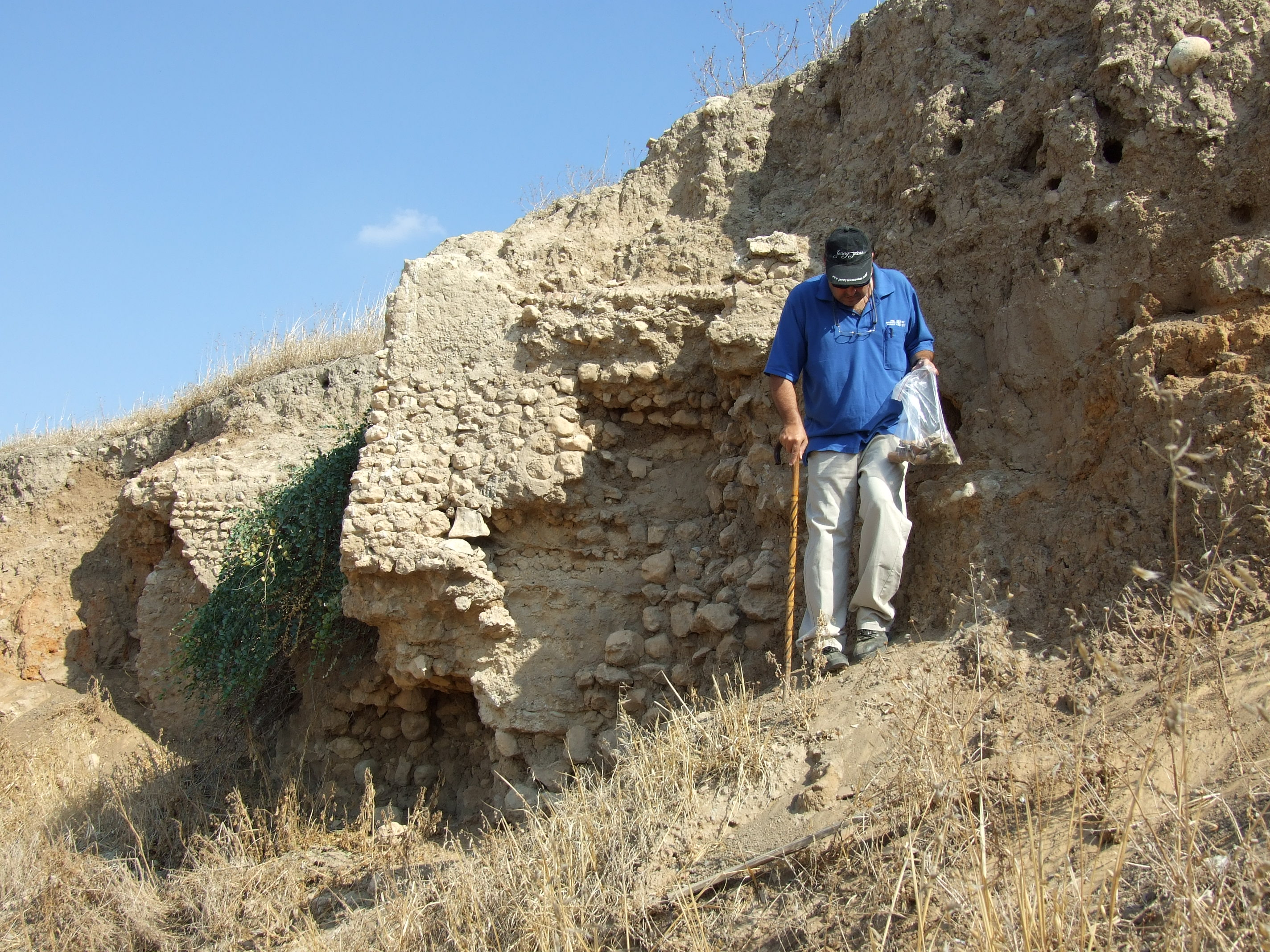 סקר ישראל מבנים חשופים במצוק הנחל בכפר ג'לדייה